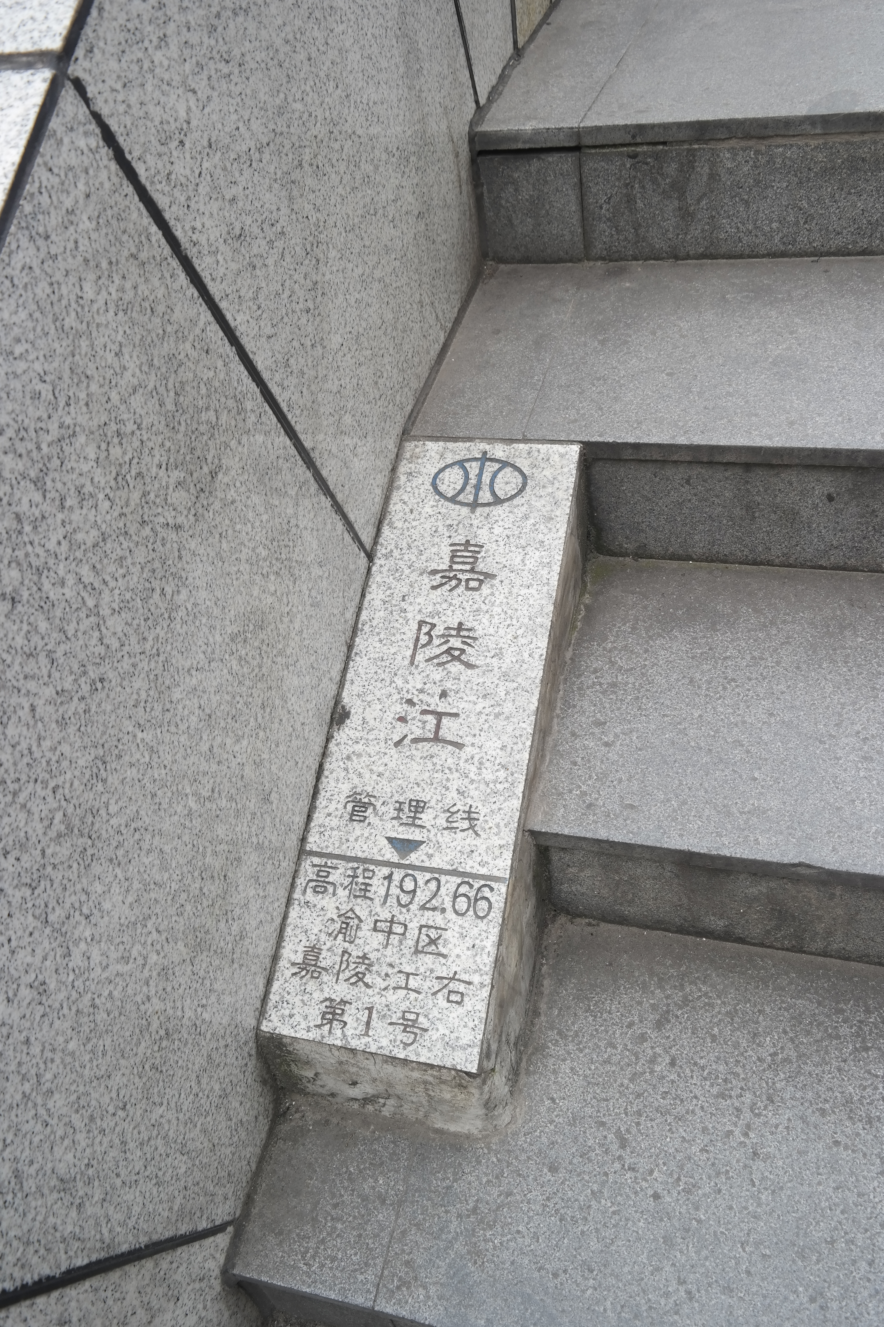 中文（中国大陆）: 嘉陵江 界碑